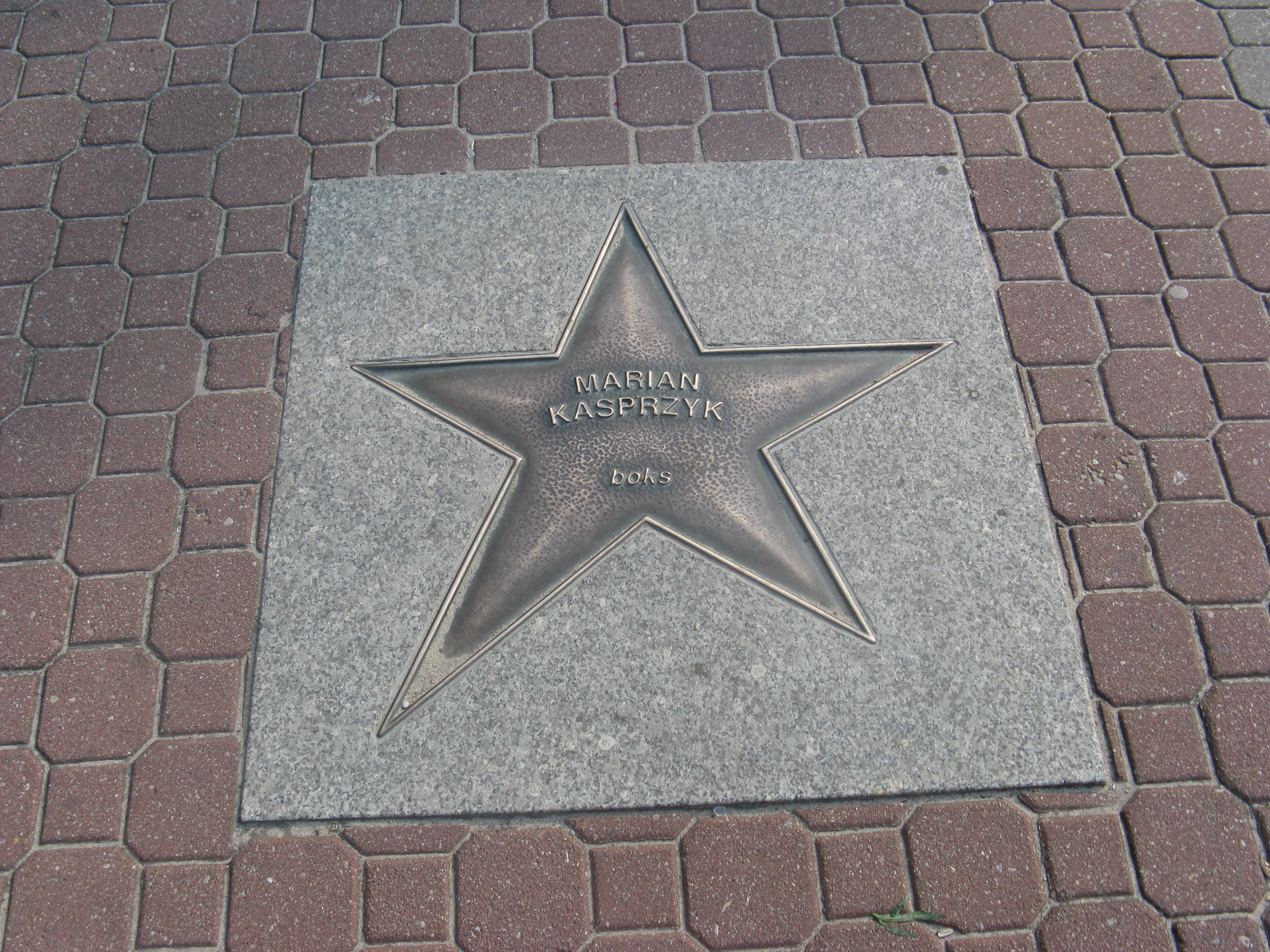 Gwiazda w Alei Gwiazd sportu we Władysławowie